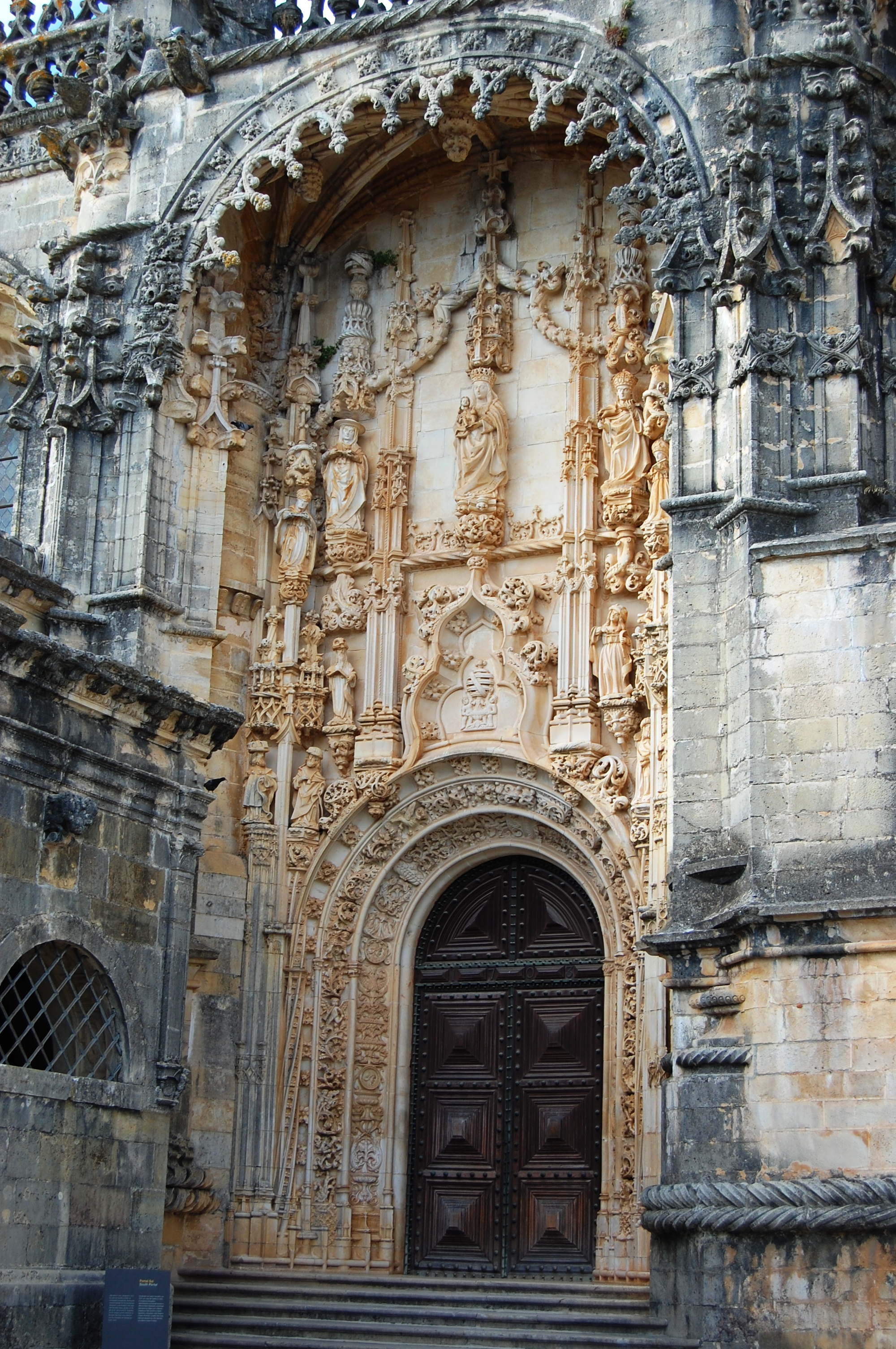 Portugal - Convento de Cristo - Door